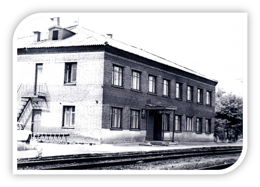 Здание СТЗ станции Обнорская